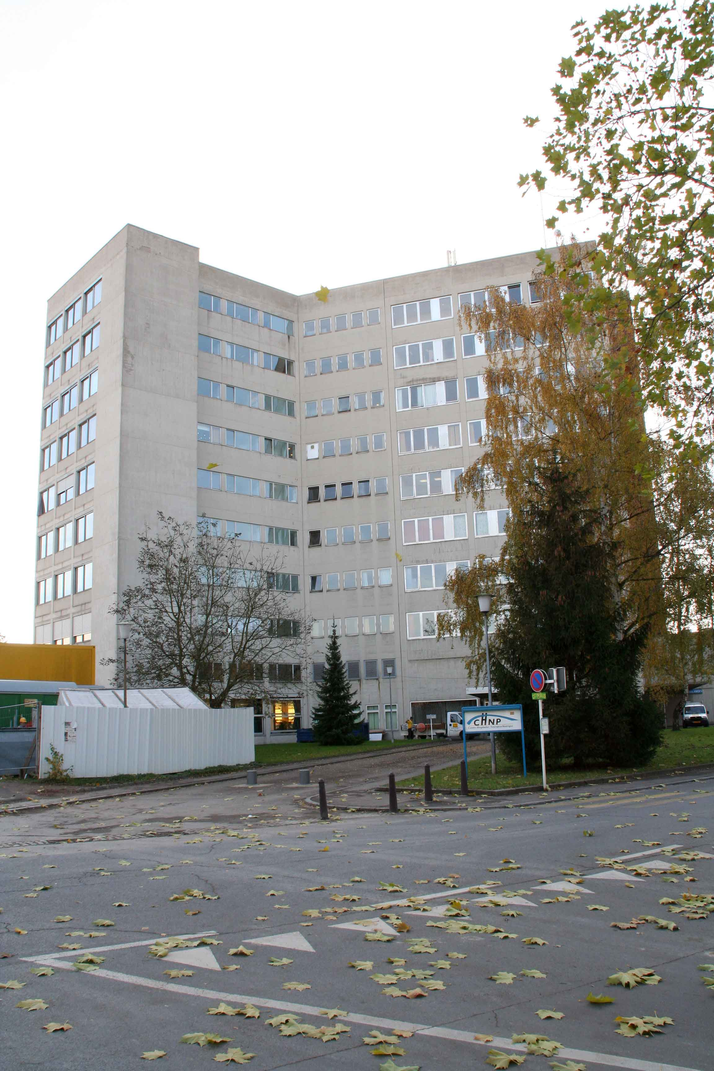 De Building vum CHNP.